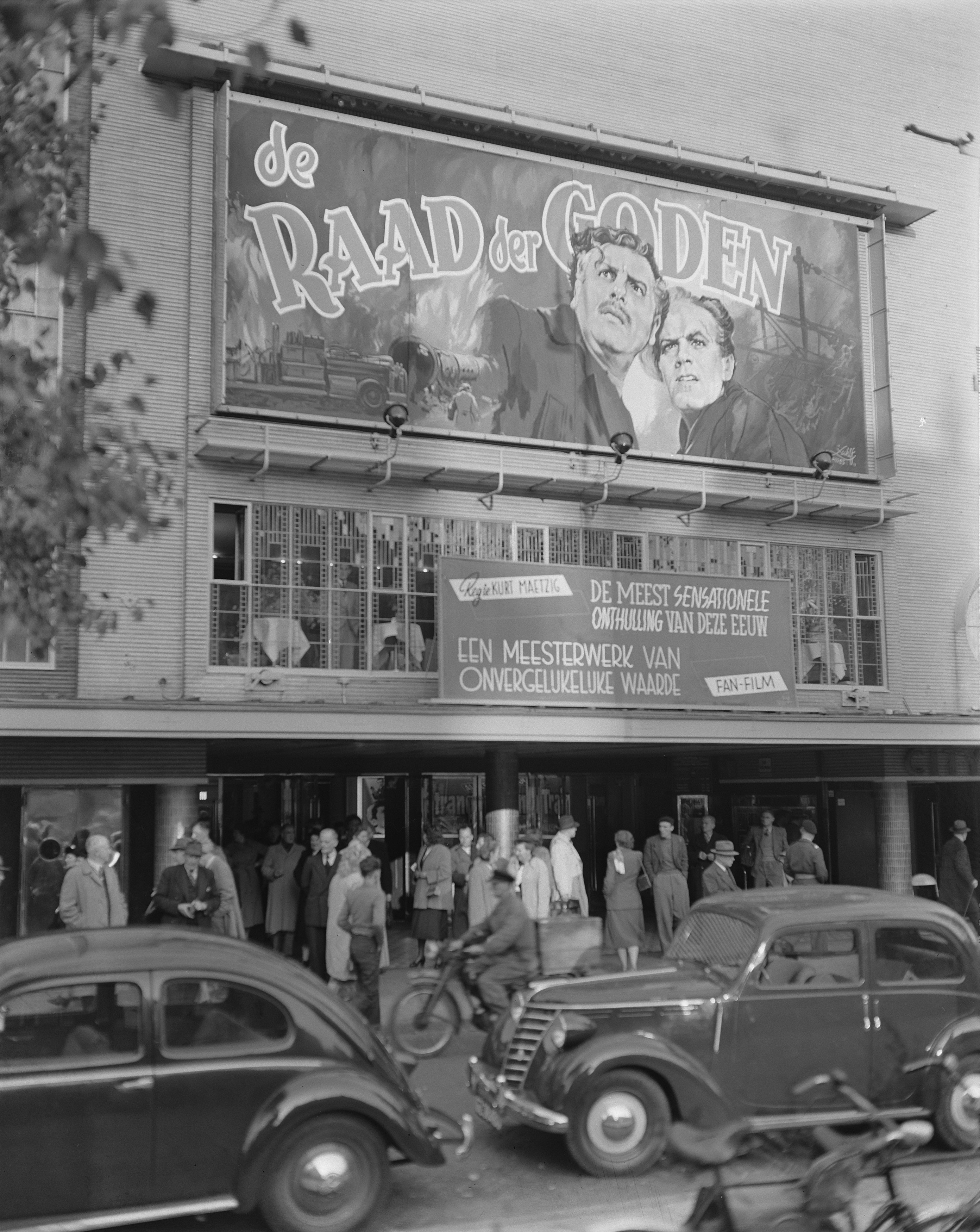 Collectie / Archief : Fotocollectie Anefo Reportage / Serie : [ onbekend ] Beschrijving : Opdracht Actueel filmmaatschappij City-theater Datum : 8 oktober 1951 Trefwoorden : opdrachten Fotograaf : Pot, Harry / Anefo Auteursrechthebbende : Nationaal Archief Materiaalsoort : Negatief (zwart/wit) Nummer archiefinventaris : bekijk toegang 2.24.01.04 Bestanddeelnummer : 904-7985